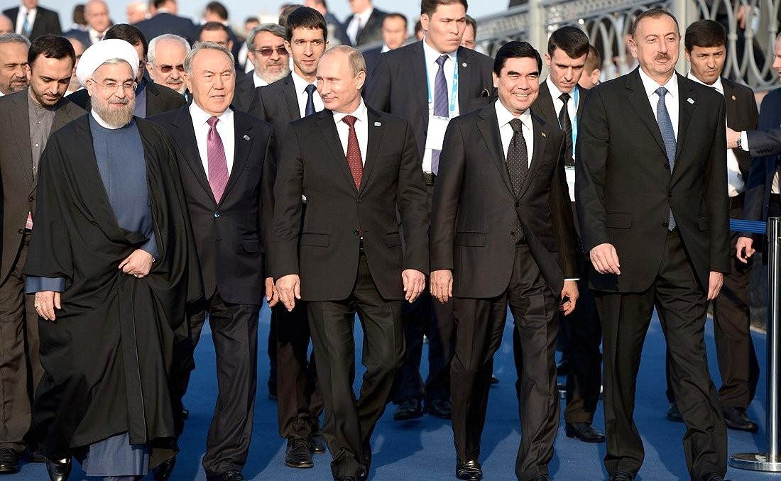 IV Каспийский саммит. Во время совместной прогулки по набережной Волги.